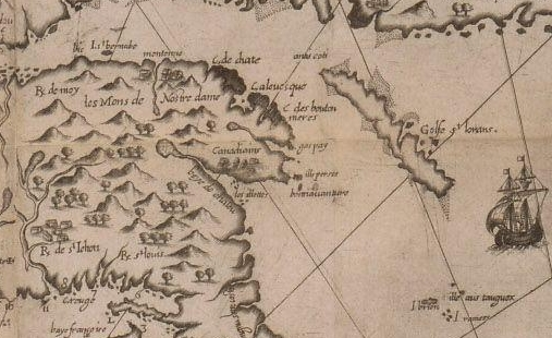 Ausschnitt aus Carte geographique de Nouvelle France von Samuel de Champlain